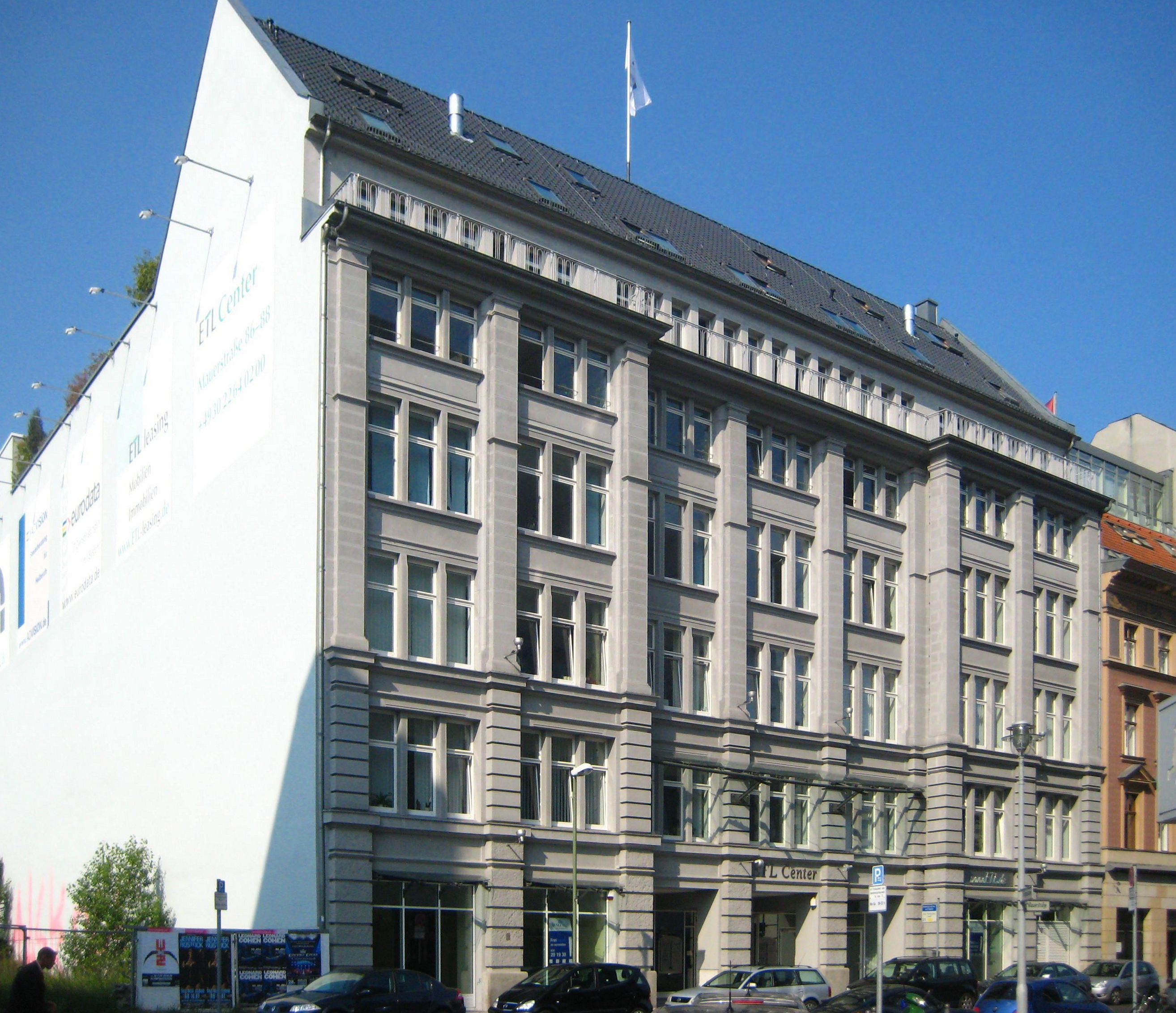 Geschäftshaus in der Mauerstraße 86-88 in Berlin-Mitte, erbaut zwischen 1895 und 1900 für die Union Baugesellschaft. Ein Umbau erfolgte in den 1930er-Jahren. Nach Schäden im Zweiten Weltkrieg wurde die Fassade verändert wiederhergestellt. Das Haus wird heute von der Steuerberatungsgesellschaft ETL Personal-Kompetenzcenter genutzt. Das Gebäude ist als Teil des Ensembles Mauerstraße denkmalgeschützt.